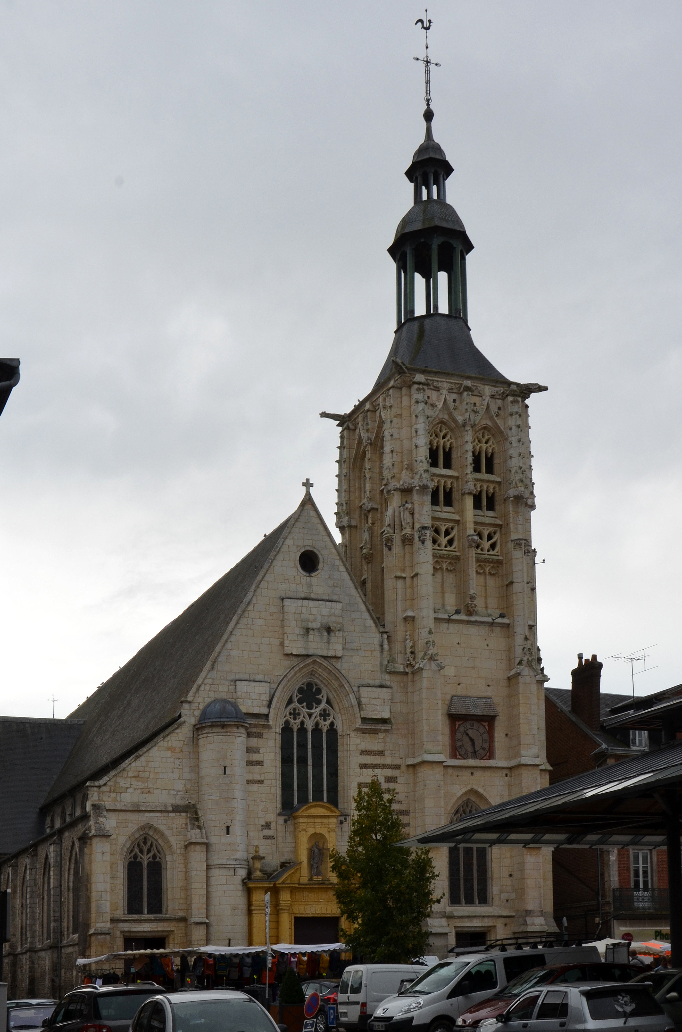 Eglise Sainte-Croix de Bernay, Eure, France .